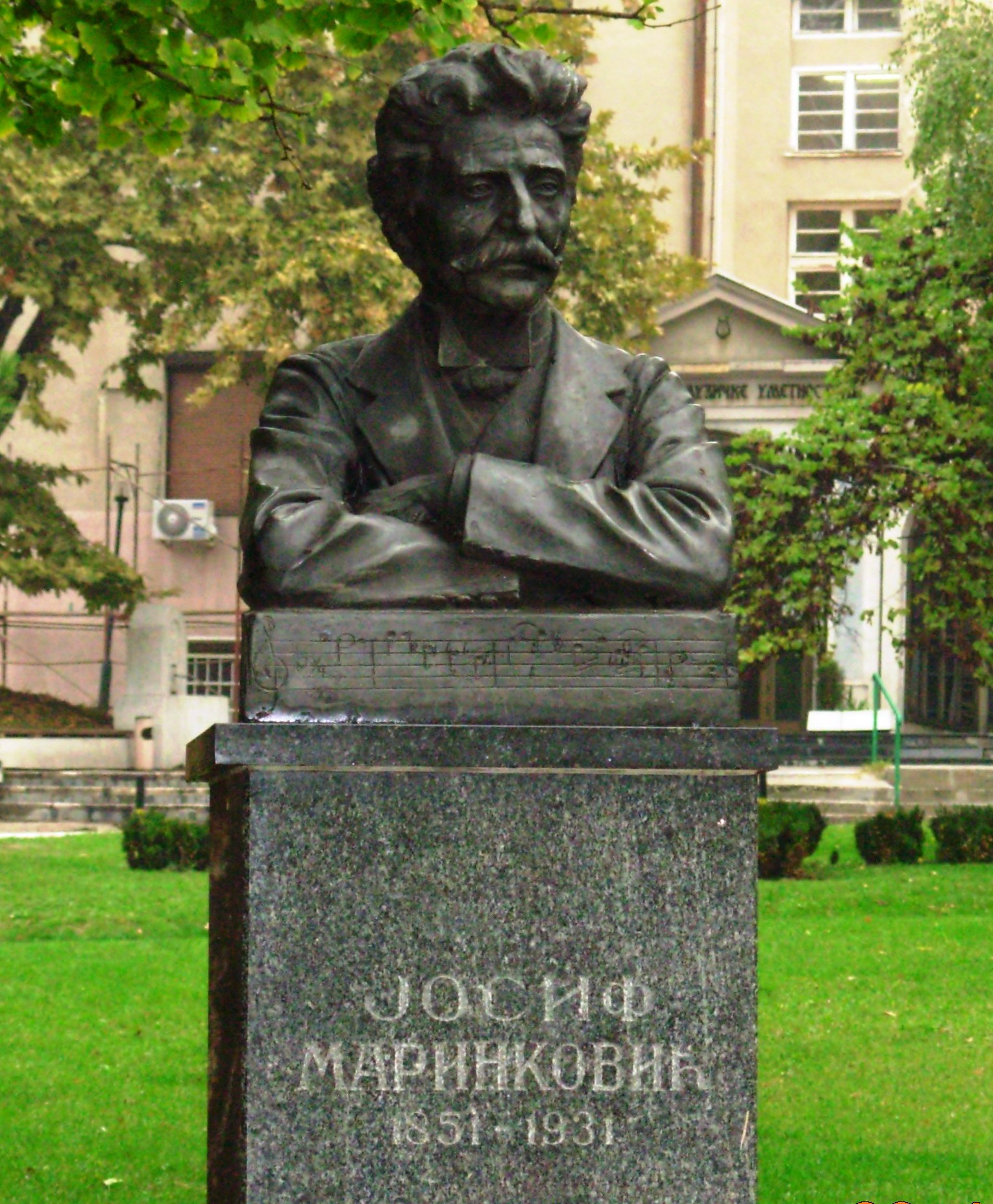 Spomenik Josifu Marinkoviću u parku Manjež, Beograd. Slikao Goldfinger